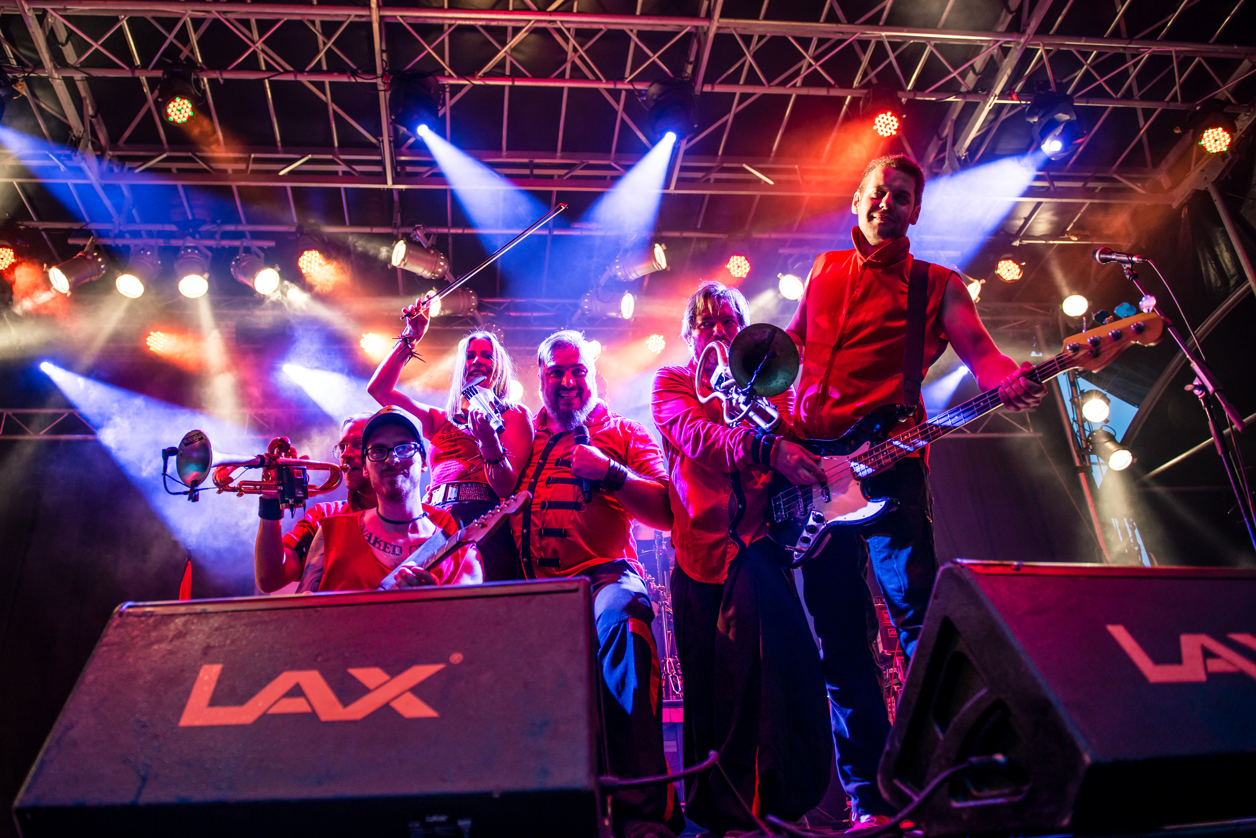 'Burgfolk Festival 2015; Mülheim - Schloß Broich': 'Russkaja'